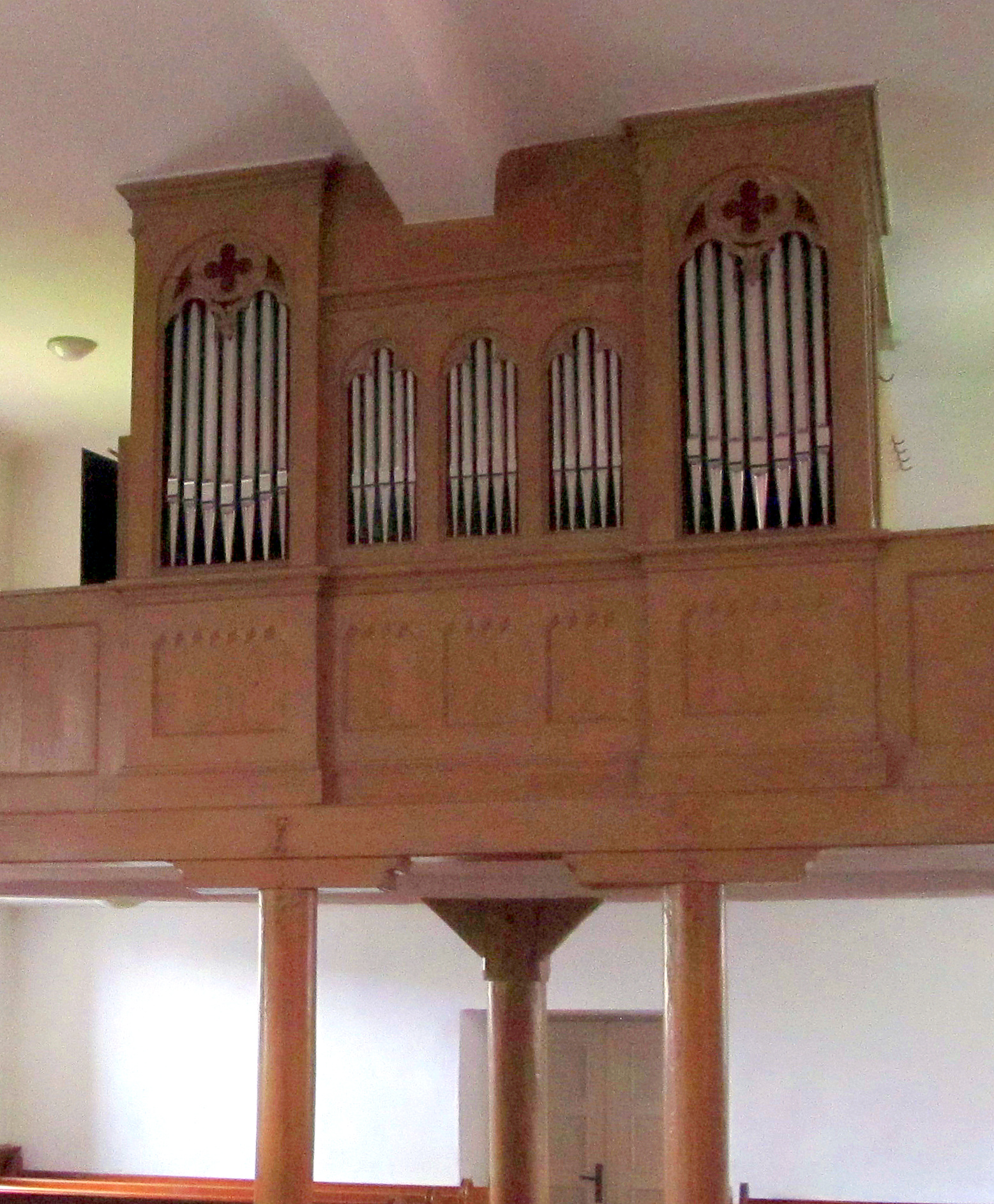 Blick ins Innere der protestantischen Kirche in Wolfersheim, einem Stadtteil von Blieskastel, Saarland